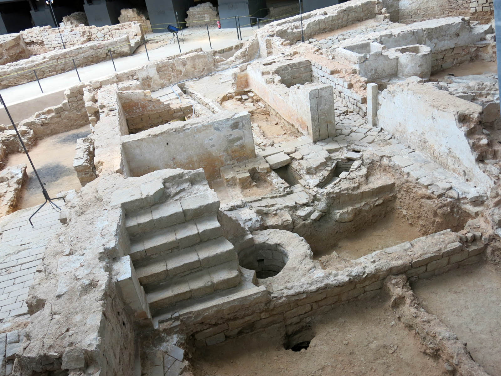 Mercat del Born (Barcelona). Cases Duran (N.17) Object location41° 23′ 08.76″ N, 2° 11′ 01.54″ E